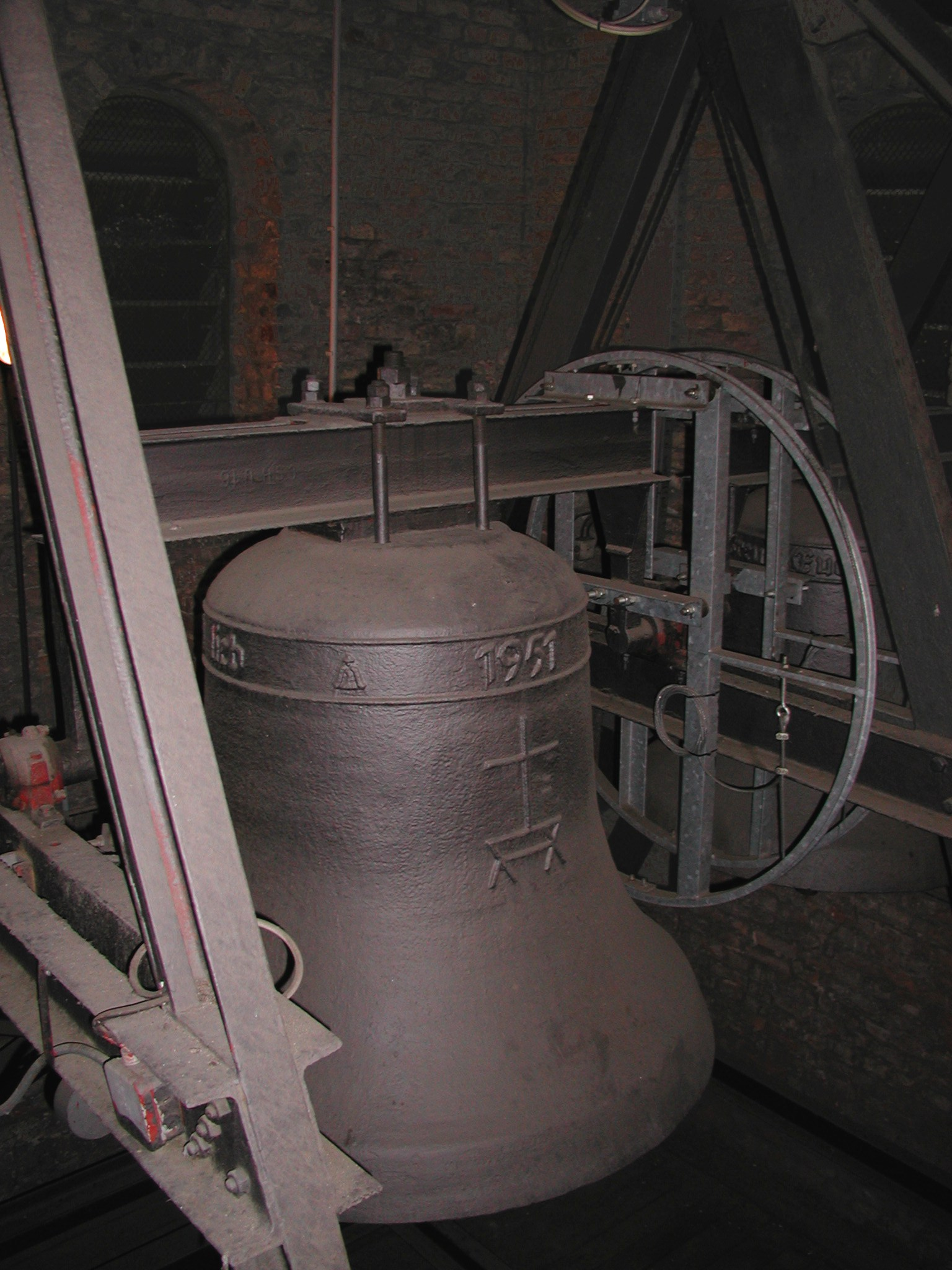 Dorfkirche Friedrichsfelde: zwei Glocken